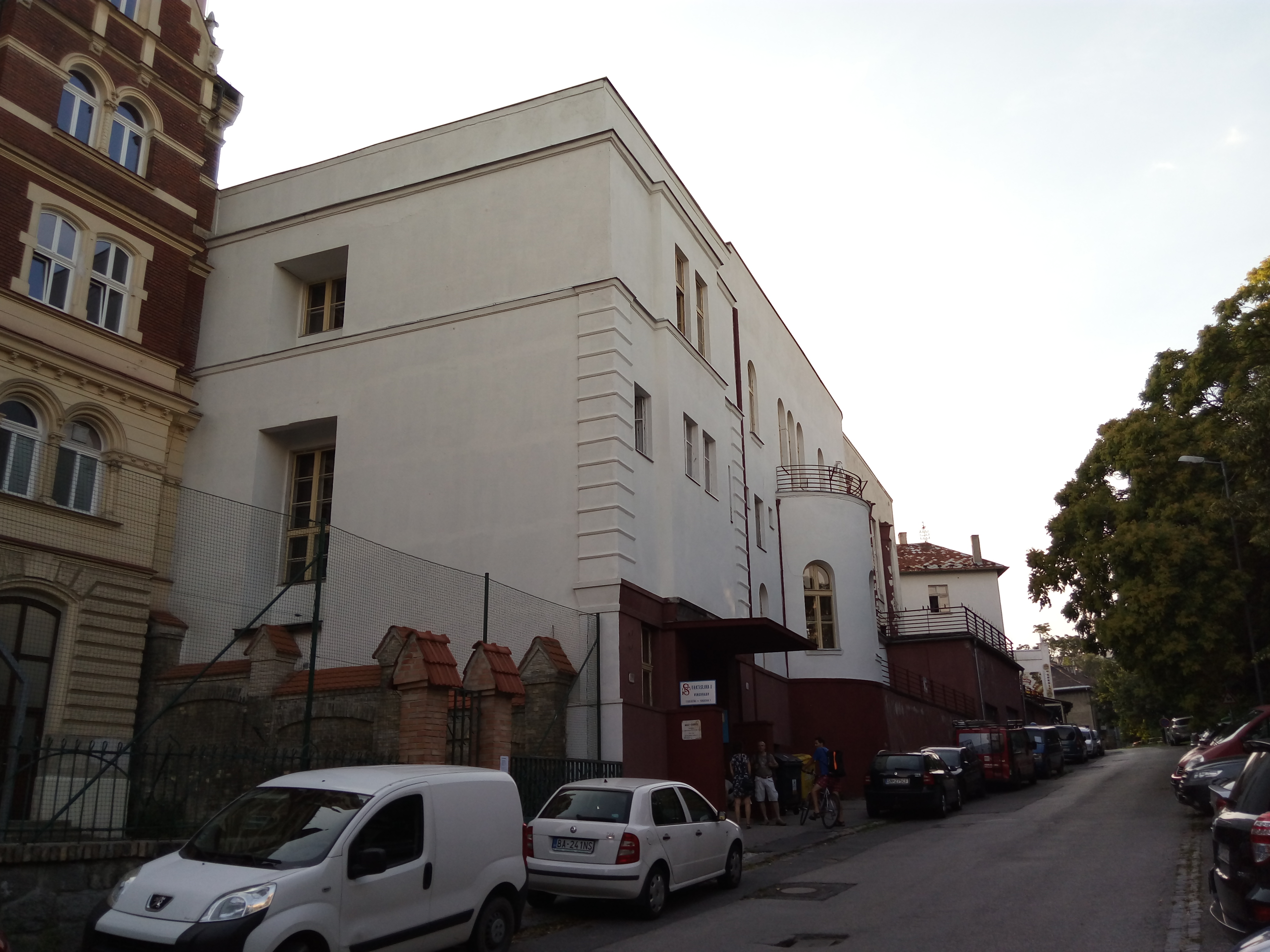 Sokolská, Staré Mesto, Bratislava